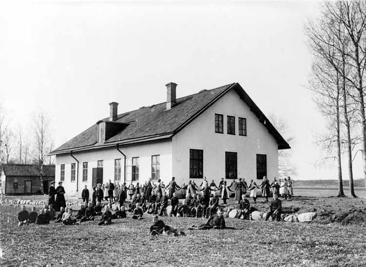 Aspnäs skola i Jakobsberg i Järfälla, 1906. Skolans lärare och elever utanför skolan. Till vänster i bakgrunden utedass. Bild nr 00416